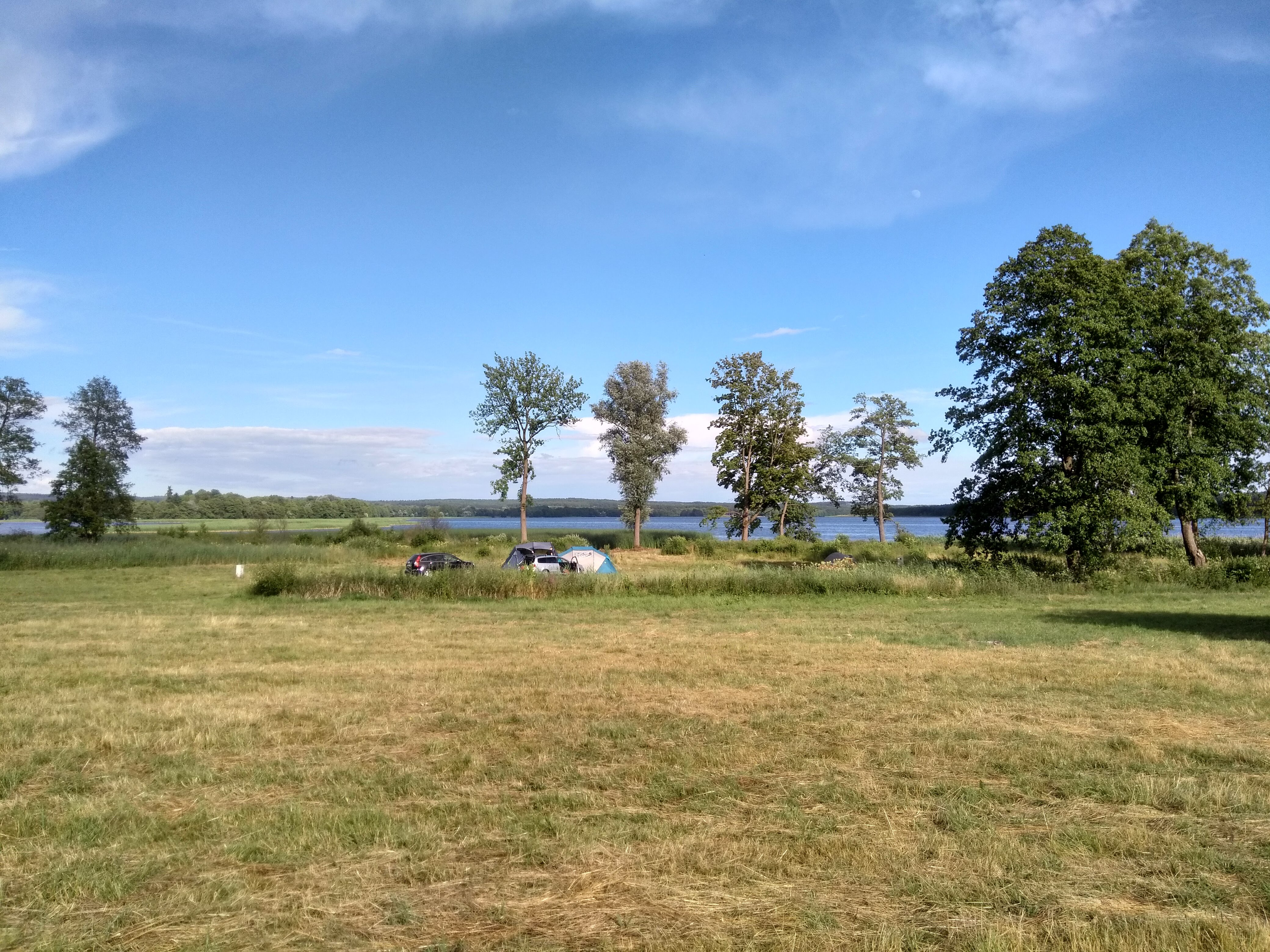 Wyspa Sołtysie, Jezioro Lubie, Powiat Drawski, Zachodniopomorskie, Polska